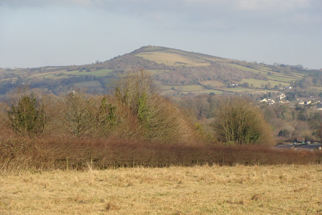 Brent Hill